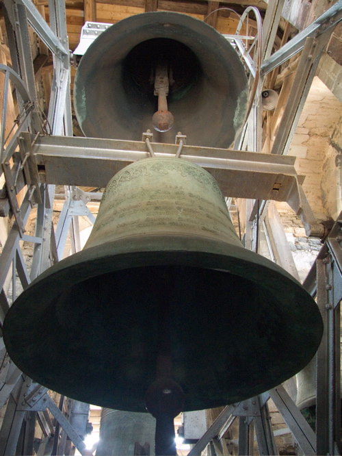 Glocken der St. Stephanikirche zu Aschersleben. Unten: Lutherglocke (Nr. 3), darüber: Sonntagsglocke (Nr. 2), hinten Mitte: Kammerglocke (Nr. 1), rechts: kleine Glocke (Nr. 6).